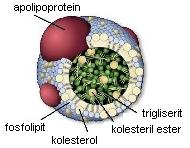 Plazma lipoproteinler şematik yapısı. Bu kaynaktan uyarlanmıştır.